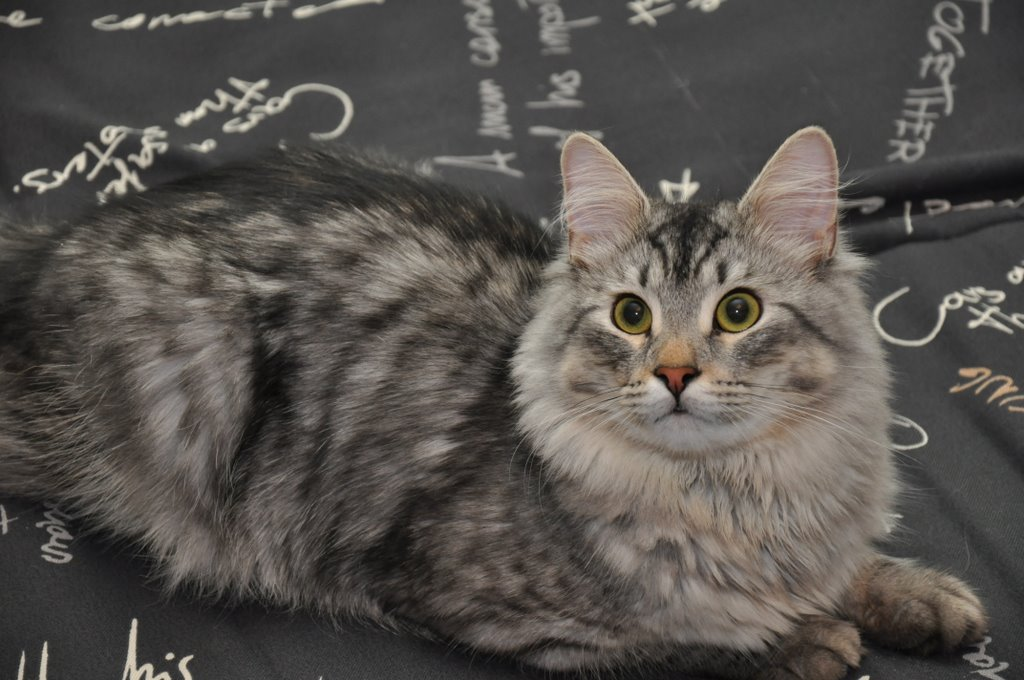 Ветерок Сиберия (окрас ns23)